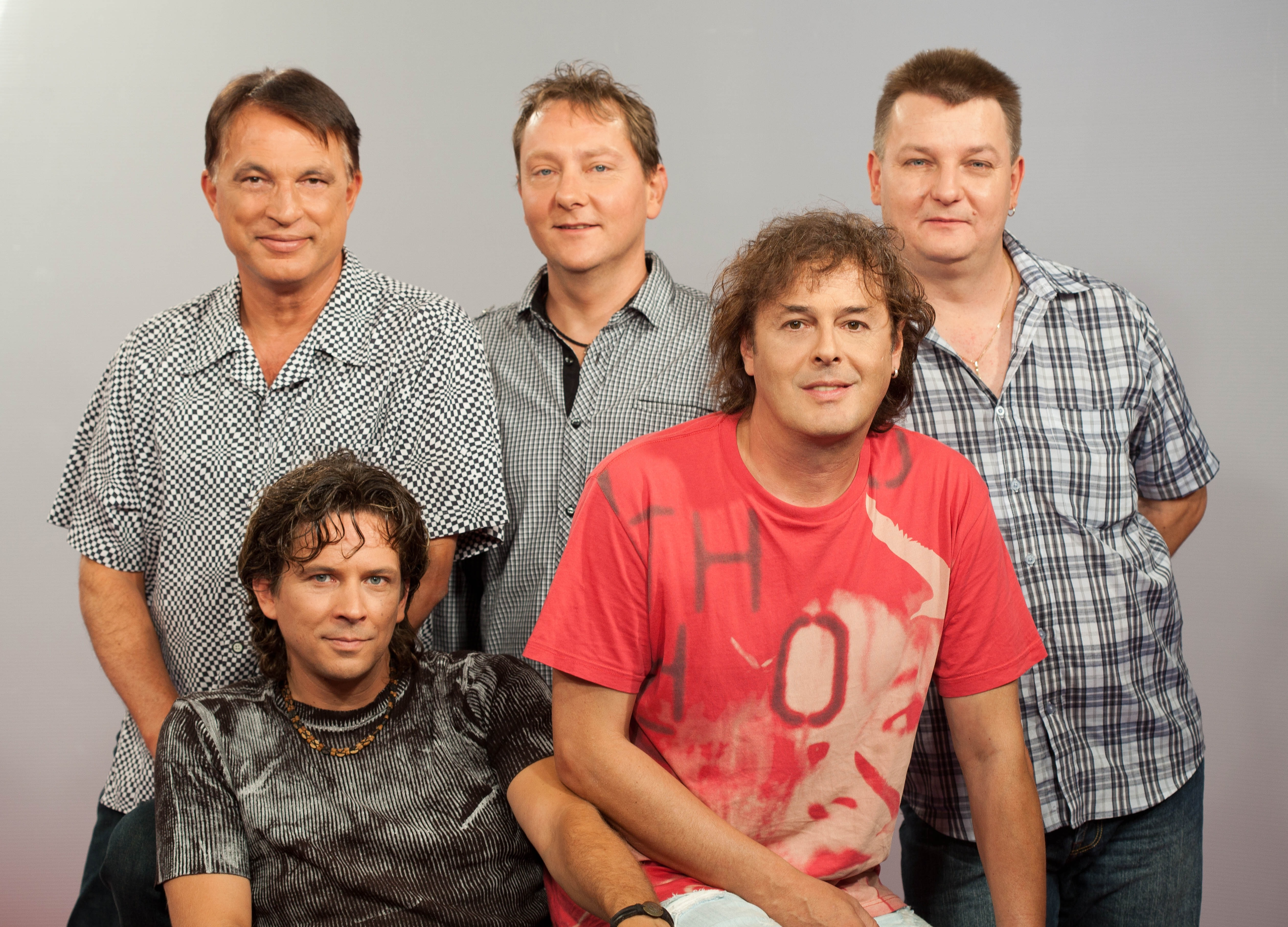 Kalamari